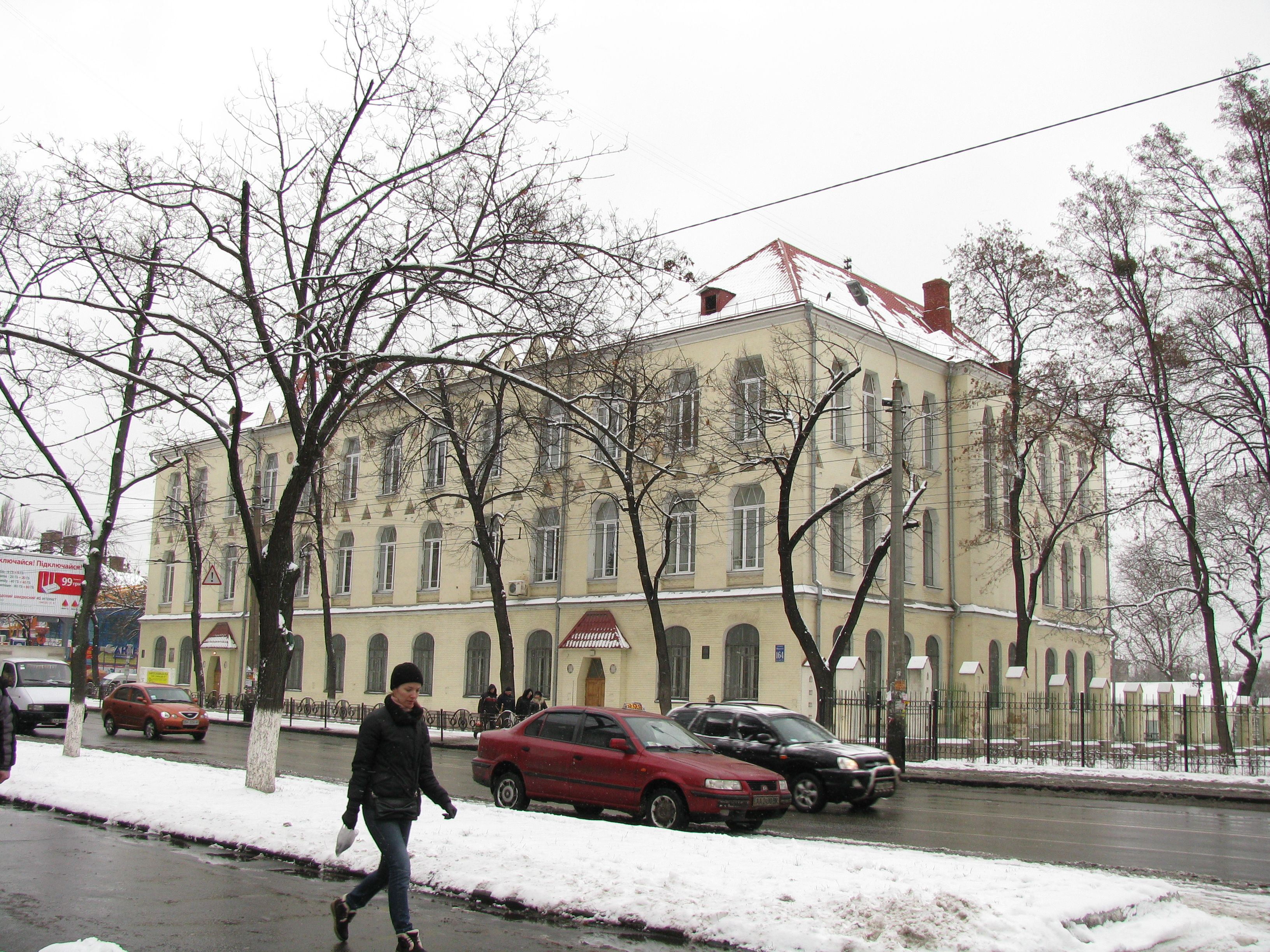 Комплекс училища ім. С. Ф. Грушевського, Київ, Кирилівська вул., 164